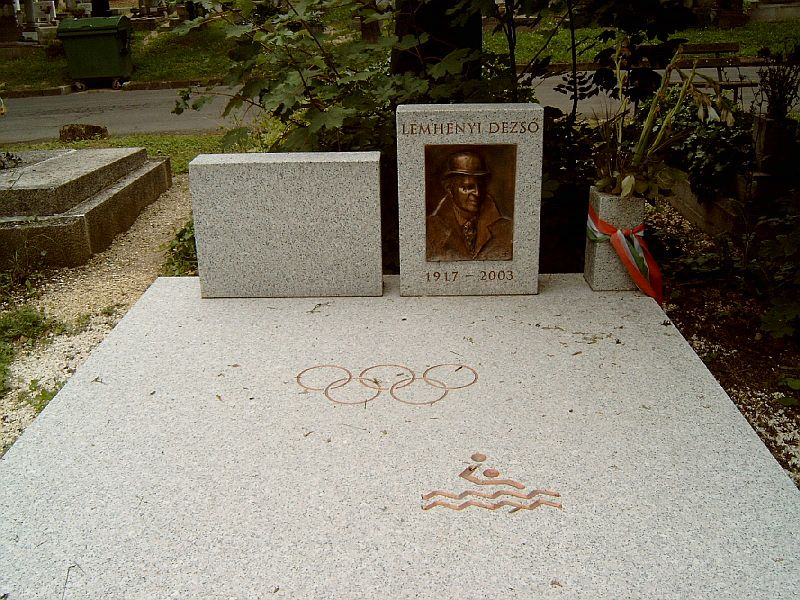 Lemhényi Dezső sírja a budapesti Farkasréti temetőben. Farkasréti temető:8/1/A-1-143/144.